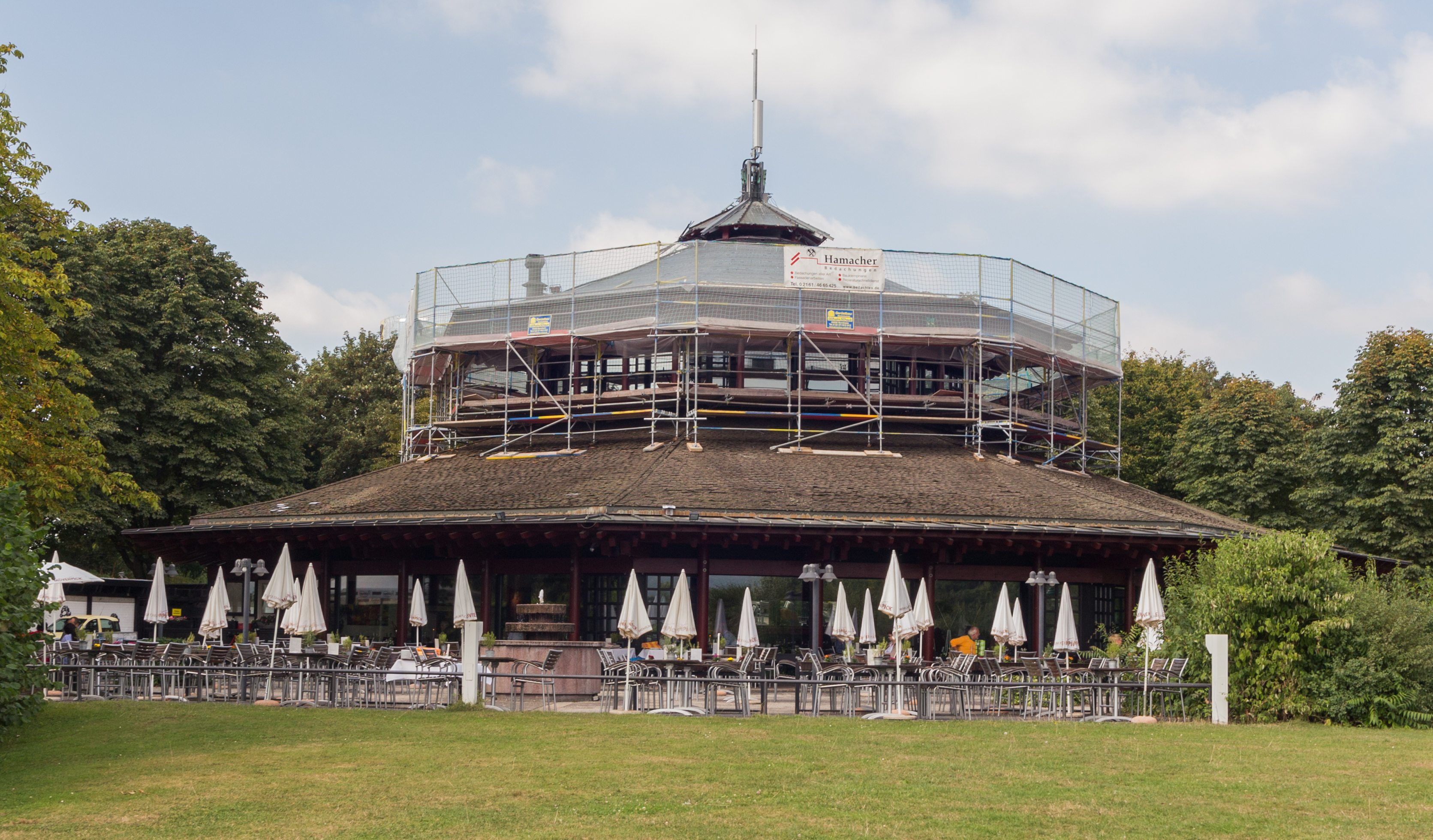 Restaurant Rheinaue, Ludwig-Erhard-Allee 20, Rheinaue, Bonn, district Hochkreuz